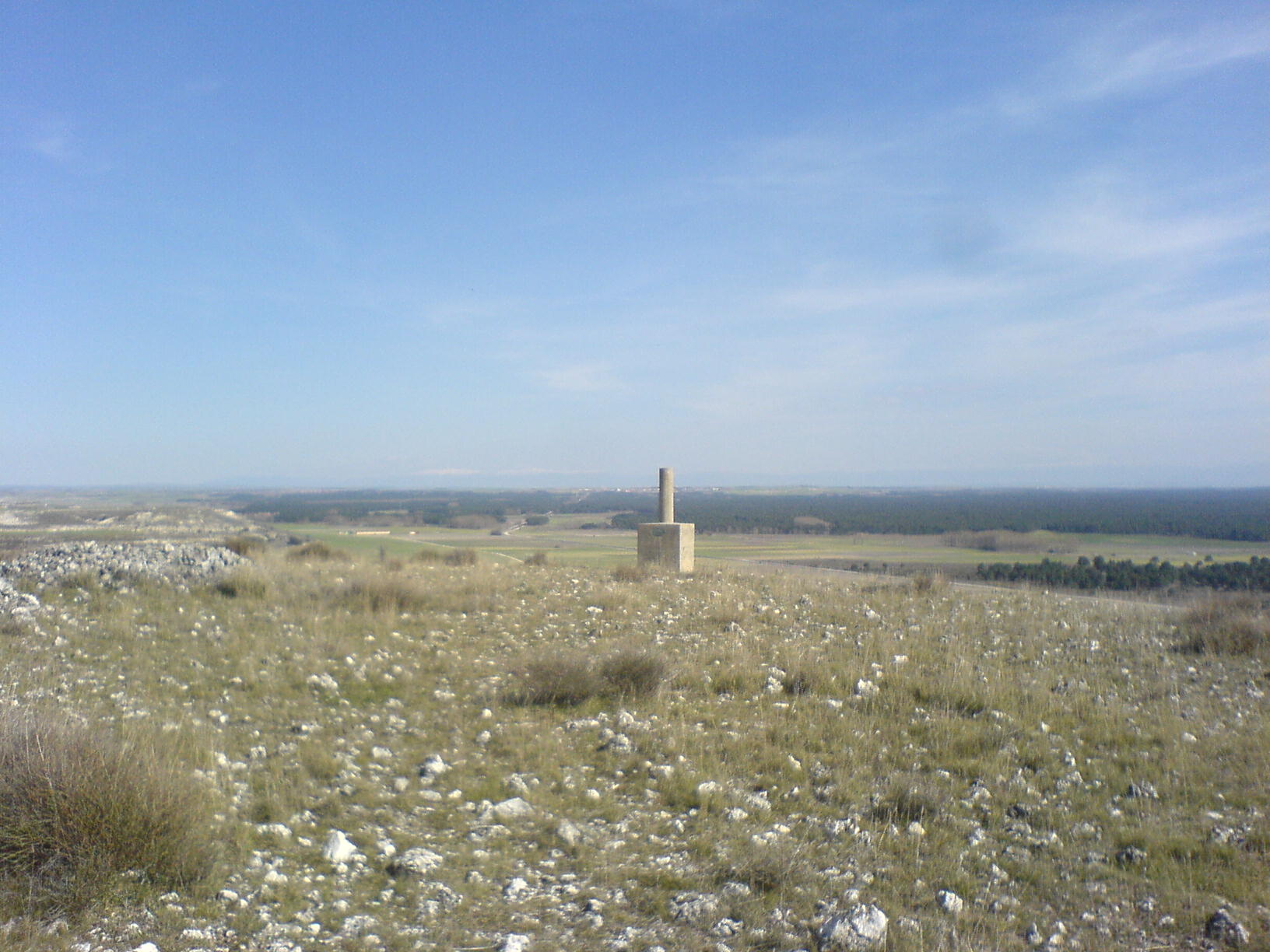 Punto geodésico localizado en Torrontillana, Dehesa de Cuéllar